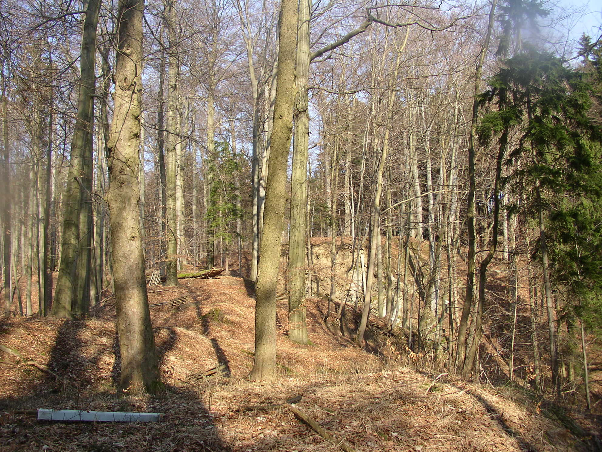 Vápenka, okres Děčín, Ústecký kraj, Česká republika